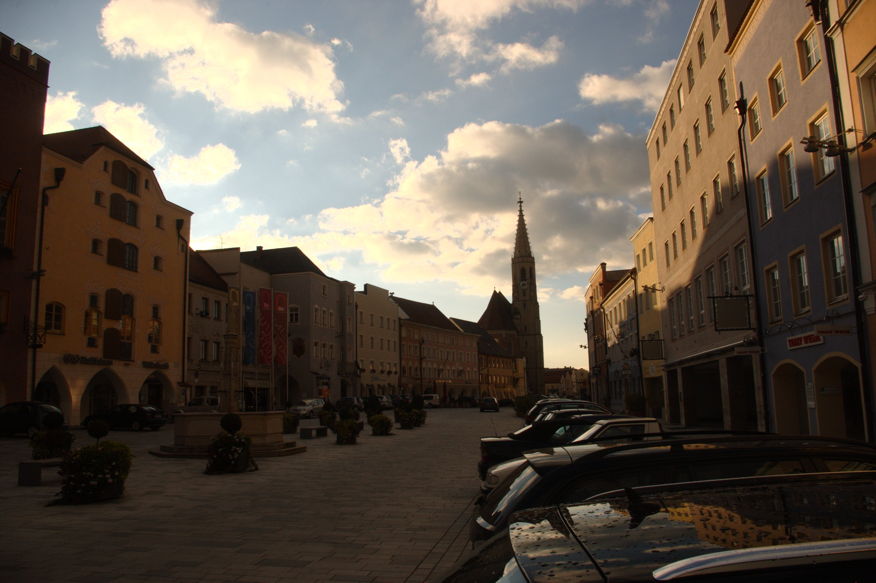 Stadtplatz von Neuötting